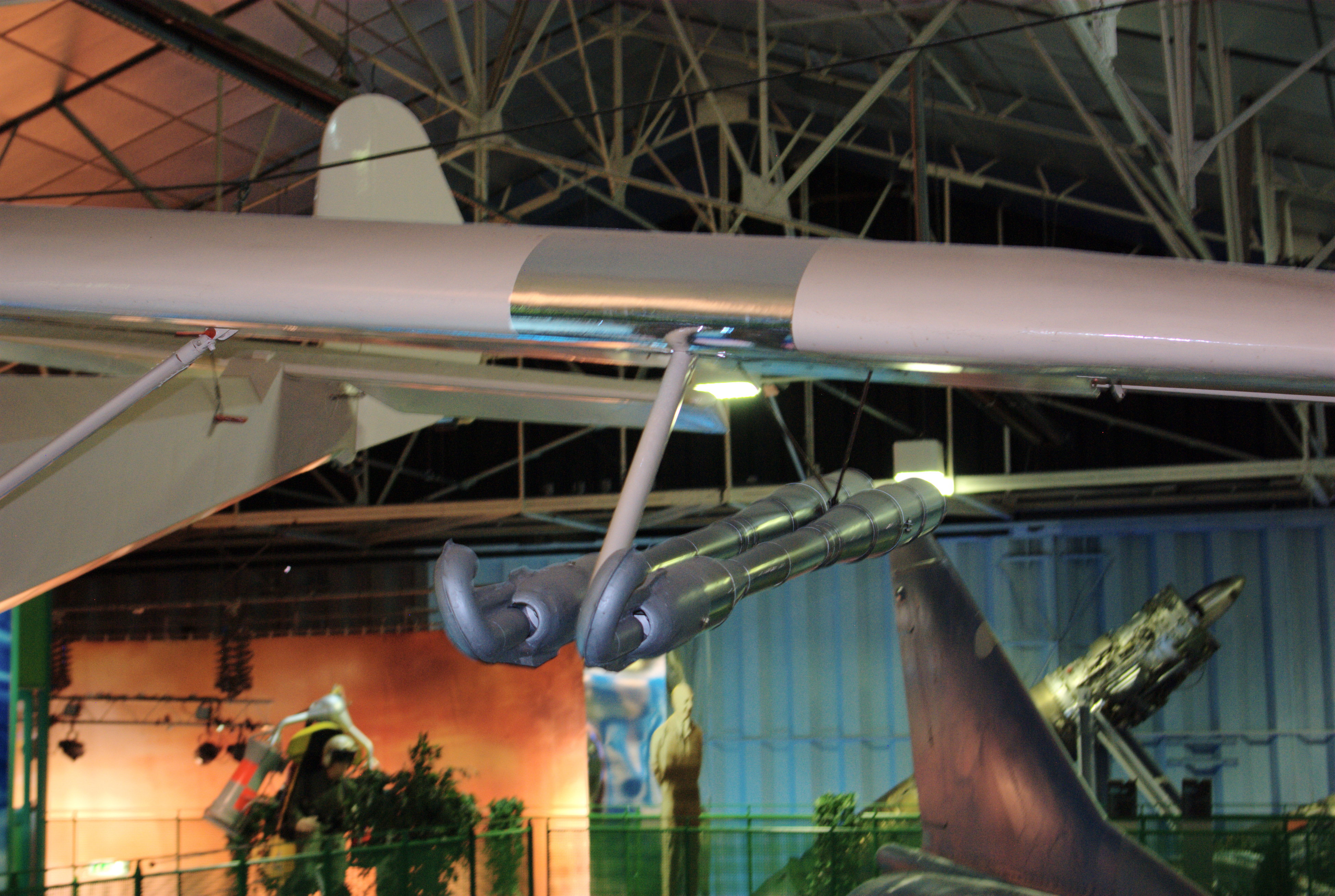 Pulsoréacteurs Escopette installés sous l'aile d'un planeur Émouchet au musée Safran.